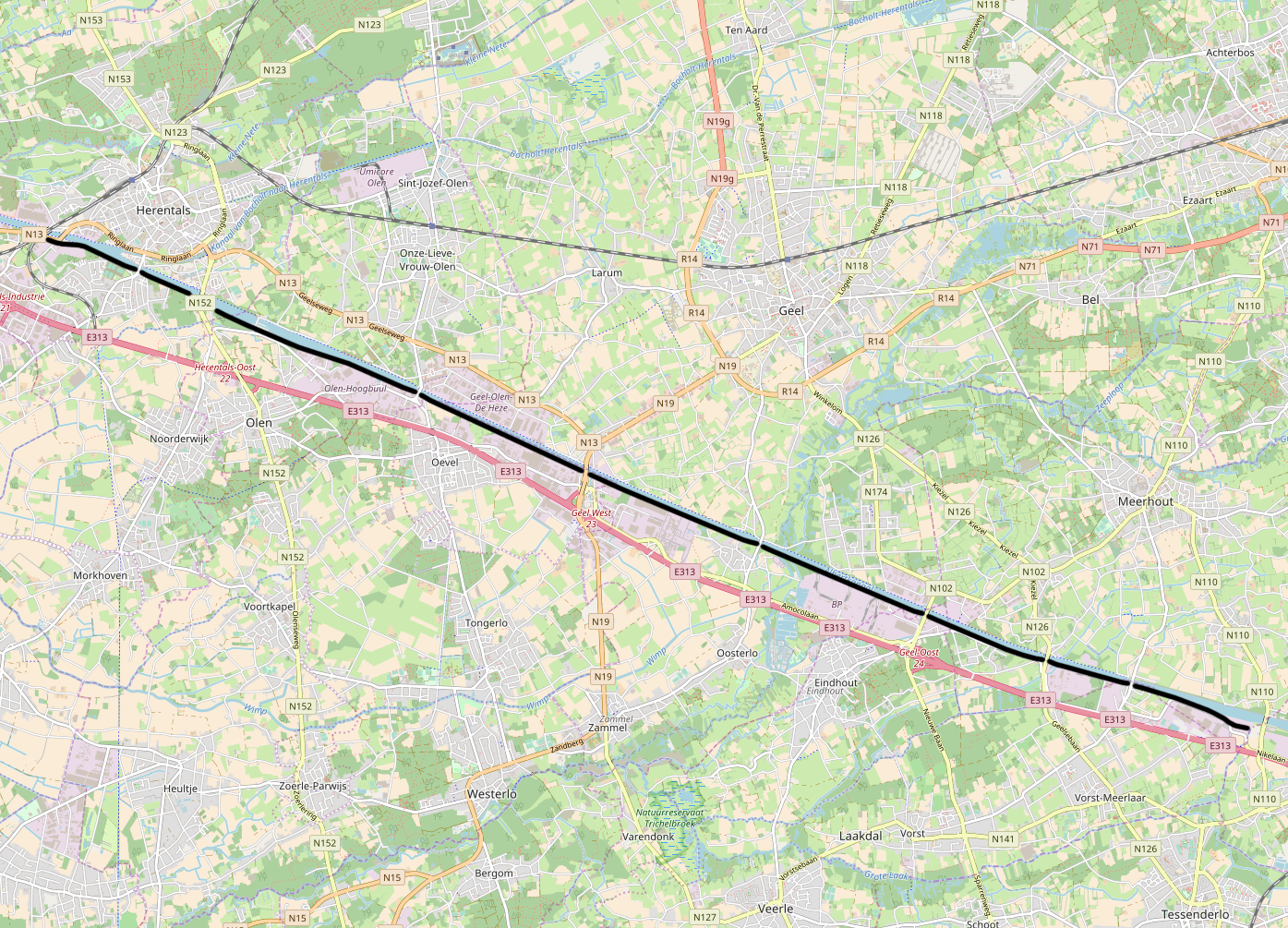 Spoorlijn 207, Y Wolfstee - Zittaart